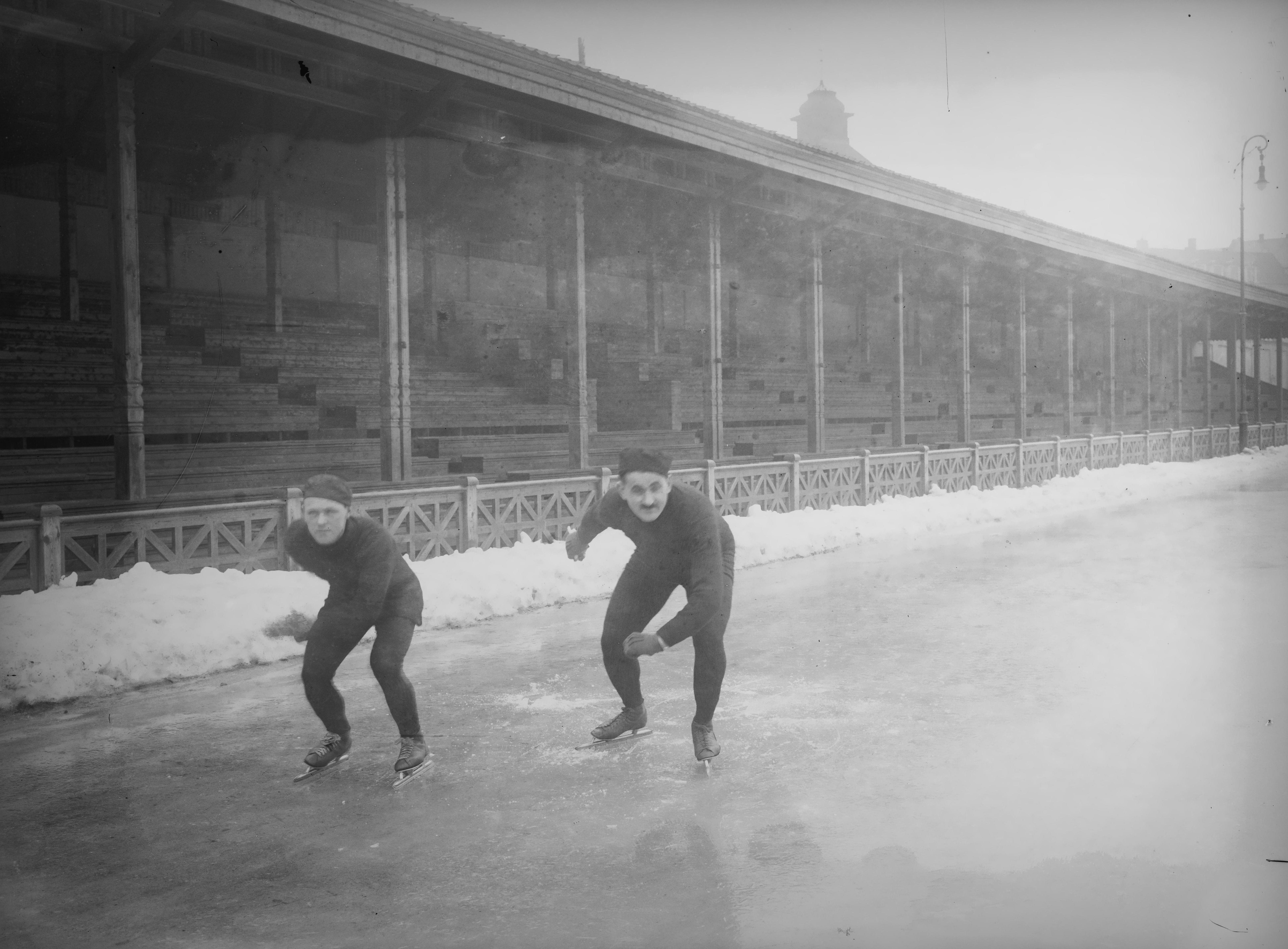 Bildet er hentet fra Nasjonalbibliotekets bildesamling. Anmerkninger til bildet var: Påskrift arkivark: Oscar Mathisen og Ole Olsen Arkivnummer: 417 Bislett, Oslo, Oslo Depicted person: Mathisen, Oscar Depicted person: Olsen, Ole